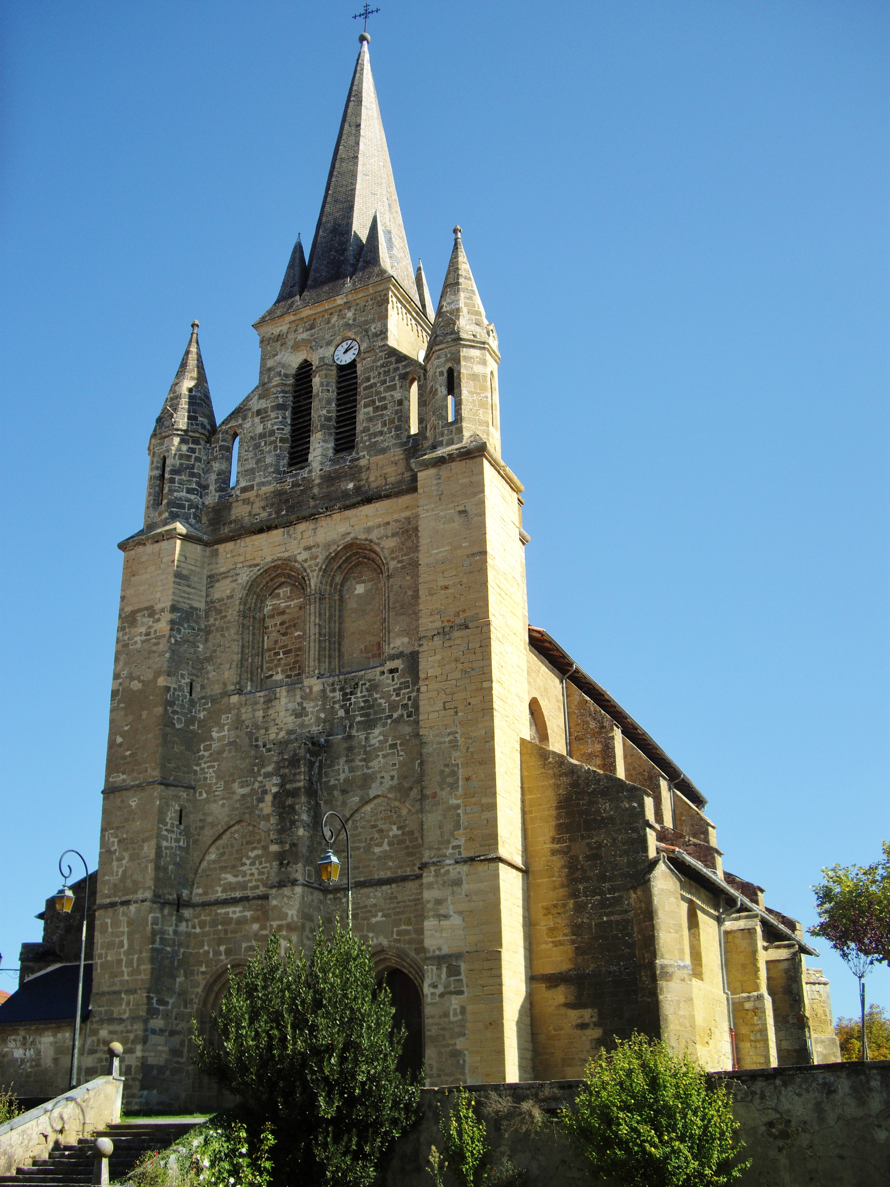 Église Saint-Julien de Galan, Hautes-Pyrénées, France